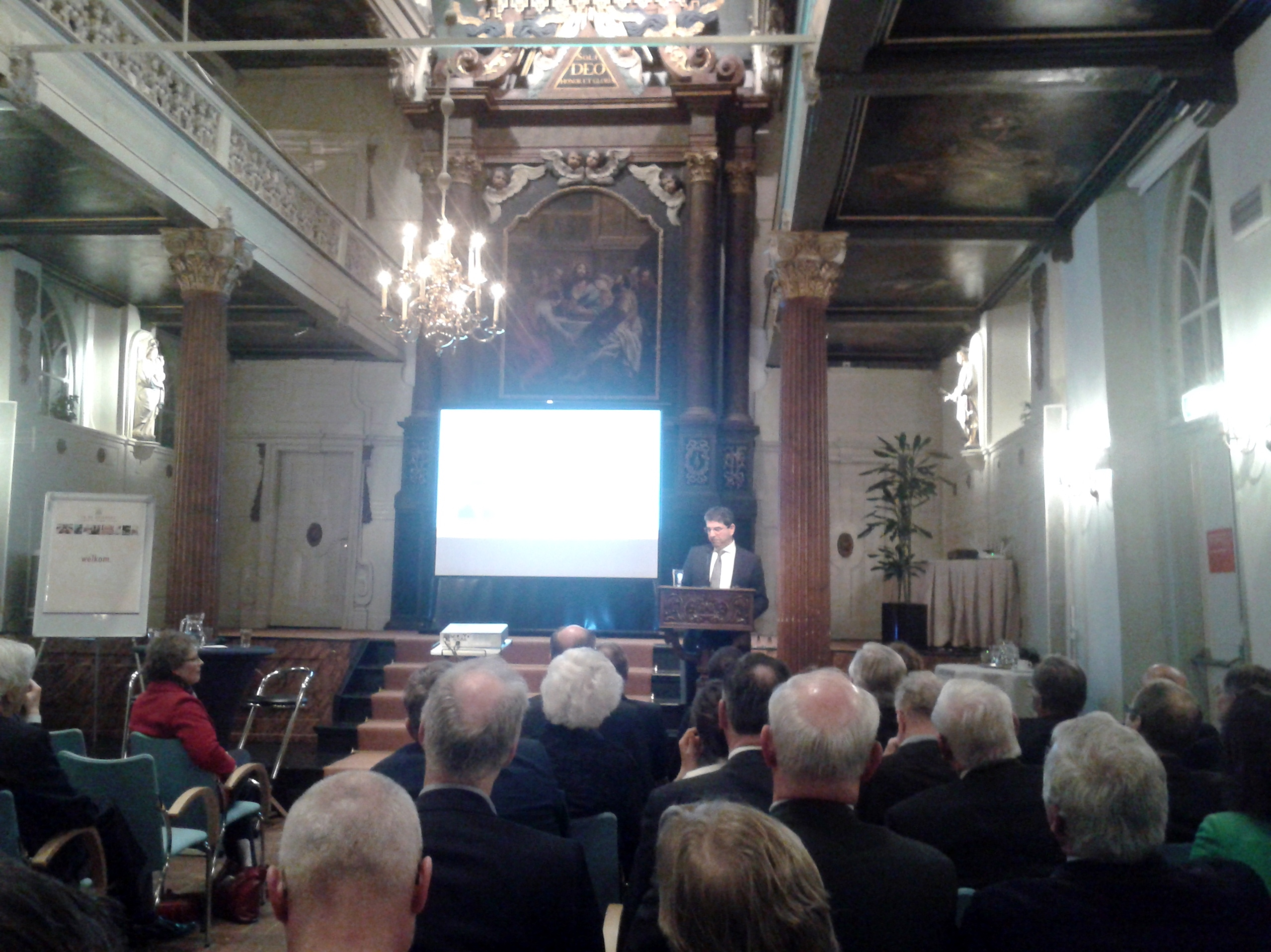 Afshin Ellian tijdens het debat 'Kerk en Staat gescheiden?' op 30 maart 2015 in In De Driehoek in Utrecht. Organisatie door de Teldersstichting (VVD) en de Guido de Brès-Stichting (SGP).